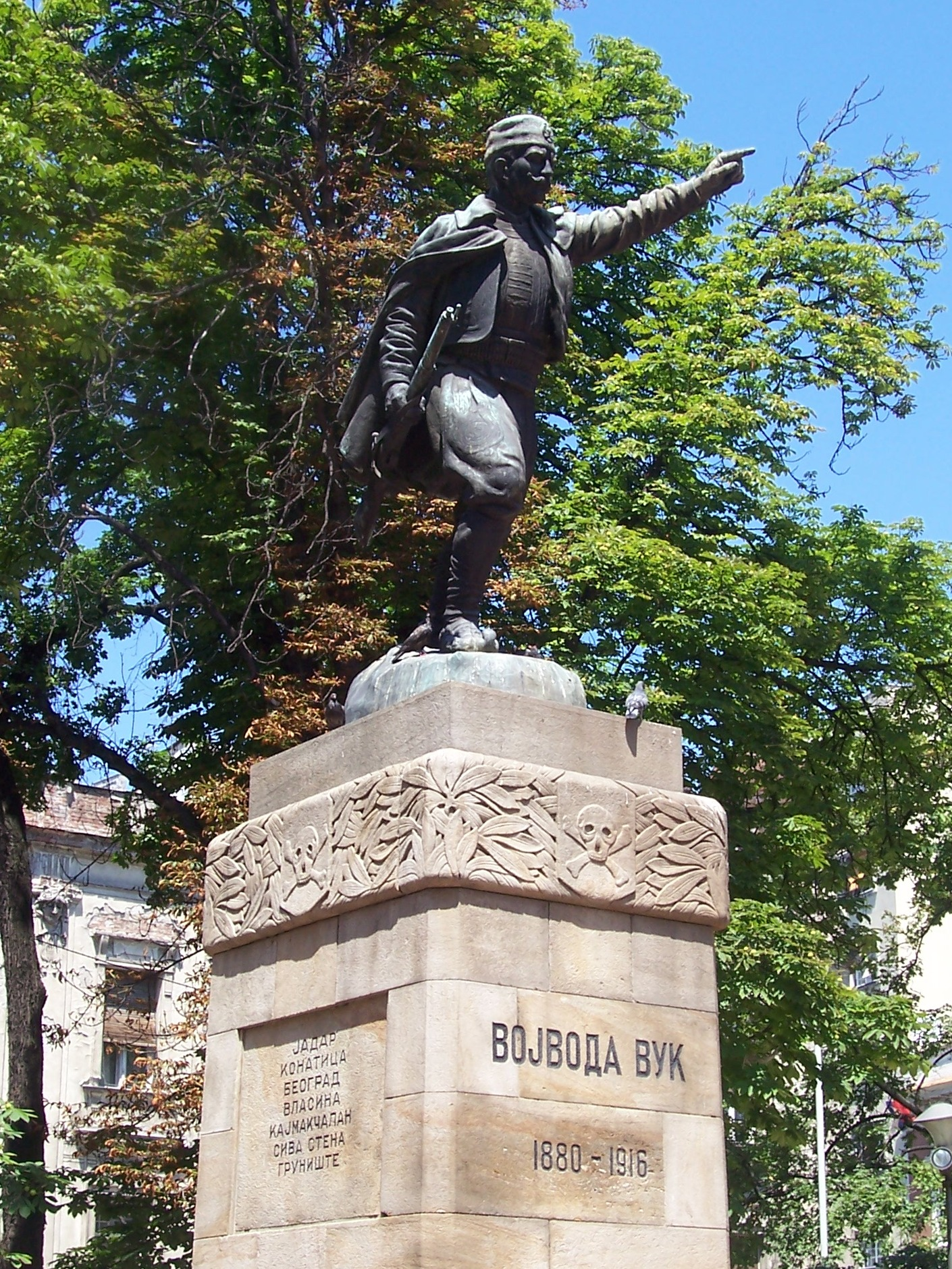 Памятник воеводе Вуку (Белград)